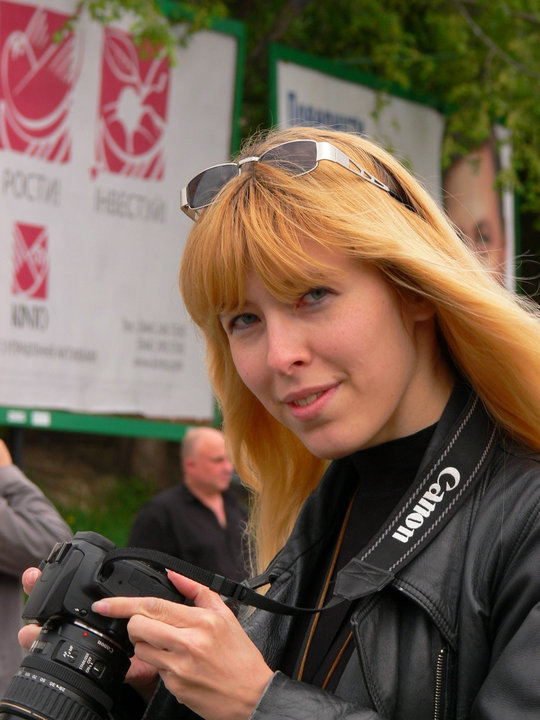 Олена Білозерська